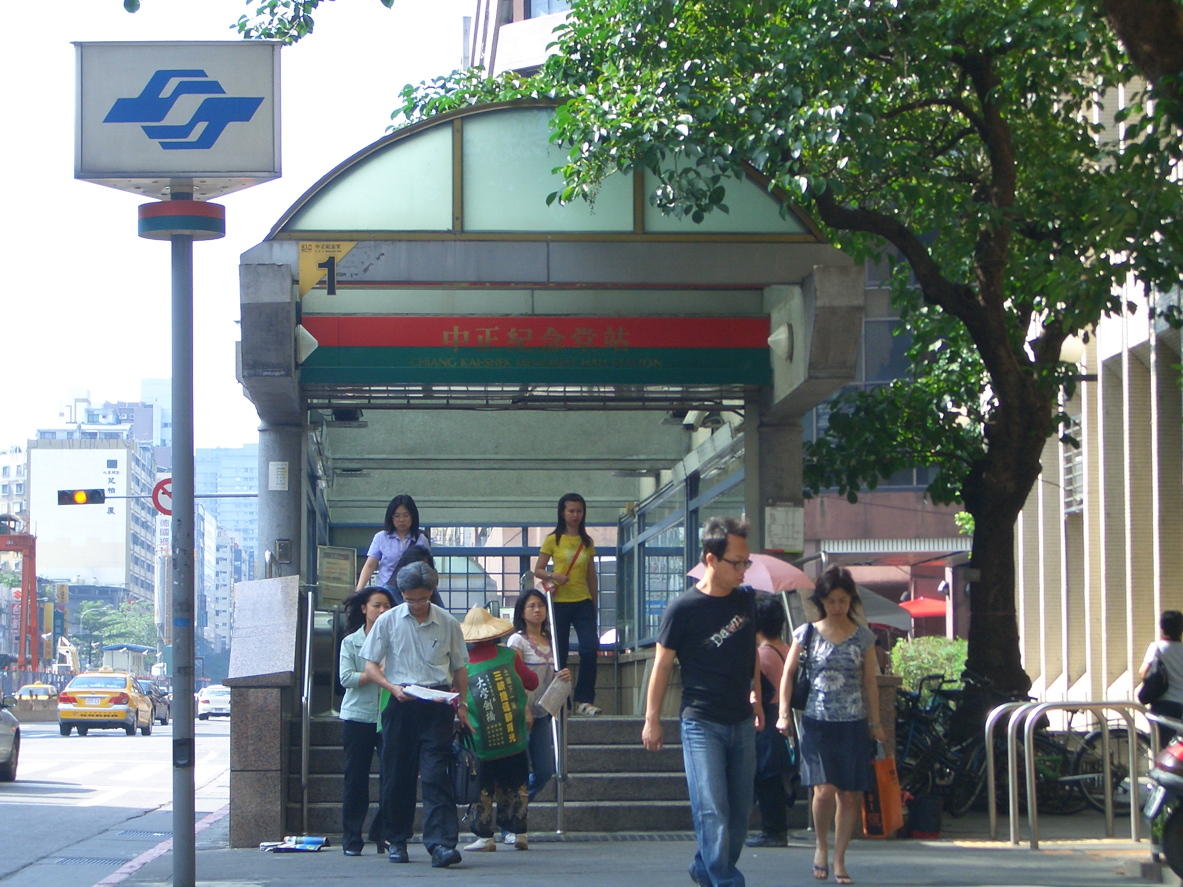 中華民國臺灣台北市台北捷運中正紀念堂車站1號出口。